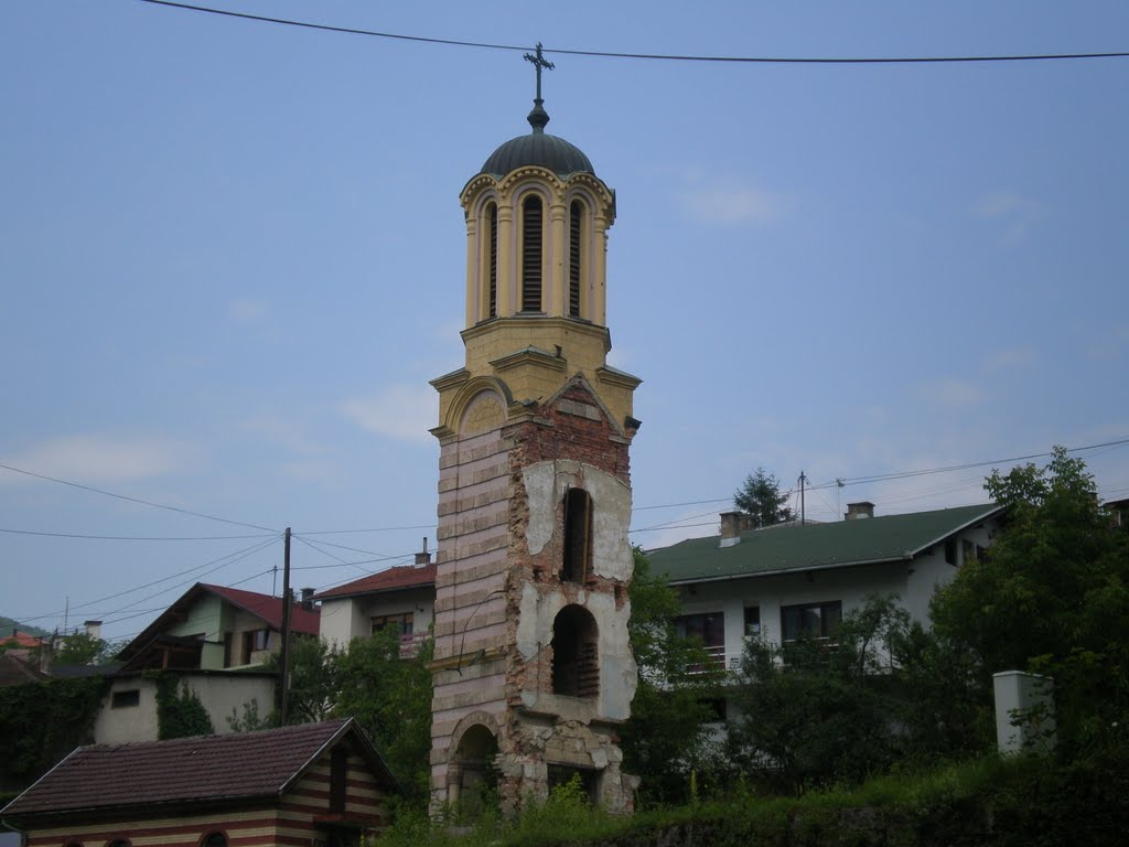 Ostaci pravoslavne crkve u Jajcu.